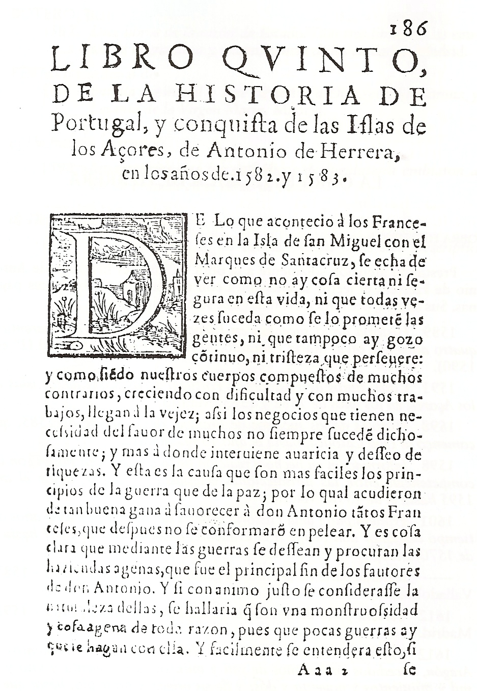 Fragmento de la Historia de Portugal de Antonio de Herrera y Tordesillas.